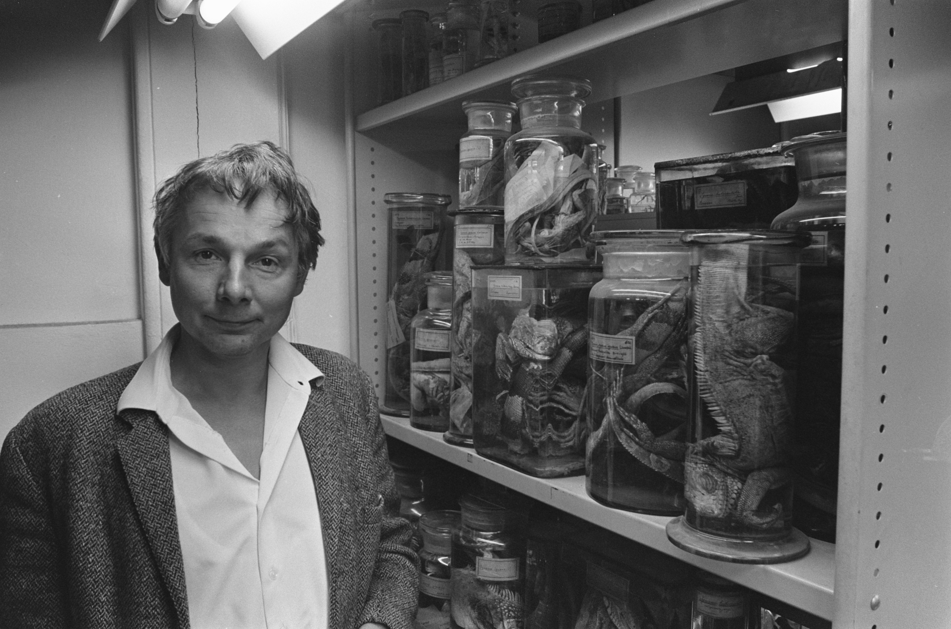 Bioloog en dichter Dick Hillenius in Amsterdam, 11 maart 1970